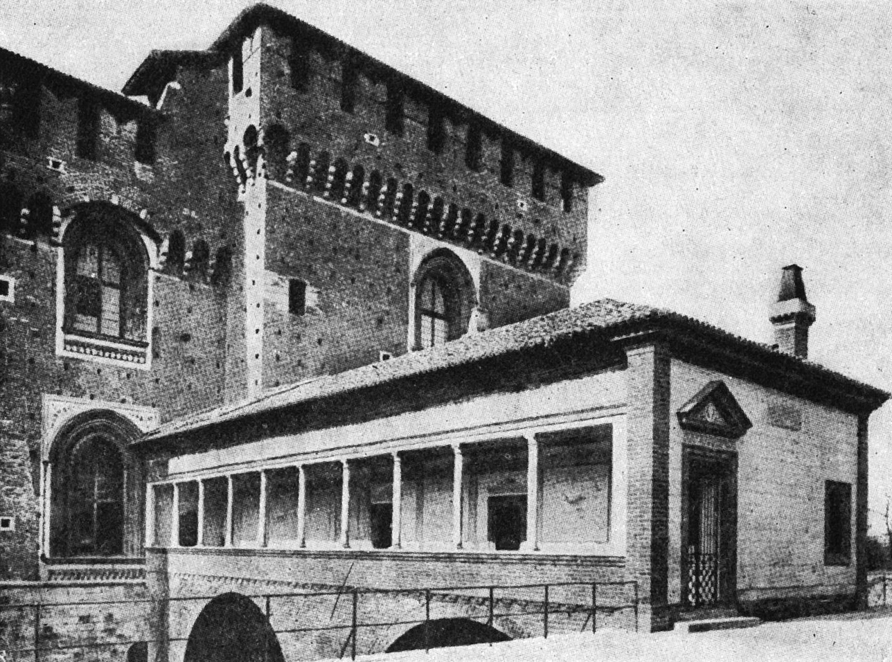 Castello Sforzesco di Milano, Ponticella di Ludovico il Moro, struttura a ponte che collegava gli appartamenti ducali alle mura esterne oggi scomparse. Il suo progetto è attribuito, pur senza riscontri certi, a Donato Bramante.